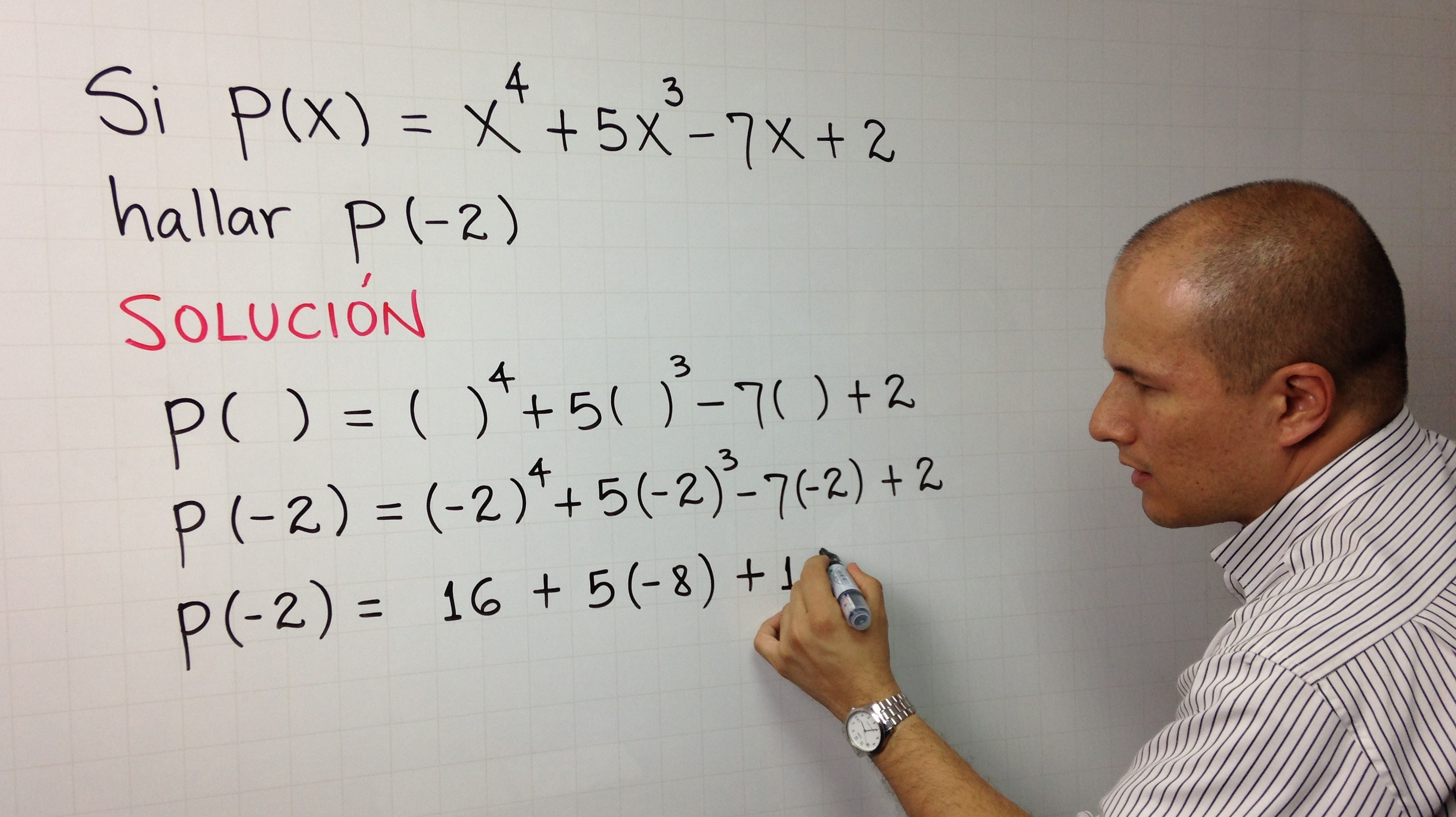 Julio Ríos Gallego profesor de matemática y físca.